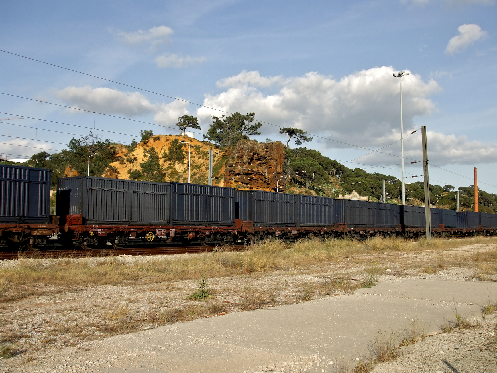 a composição do Petcoke estacionada em Setúbal • Mar, com o geomonumento da Pedra Furada ao fundo. Tipo: Vagões plataforma e vagões de bordas baixas com fueiros rebatíveis (transporte de contentores Petcoke) Local: Setúbal • Mar [Linha do Sul, PK 29] Data e hora: 7 de Abril de 2009 [18h21] Material: CP Sgs [série 454 0] e CP Regmms [série 356 3]